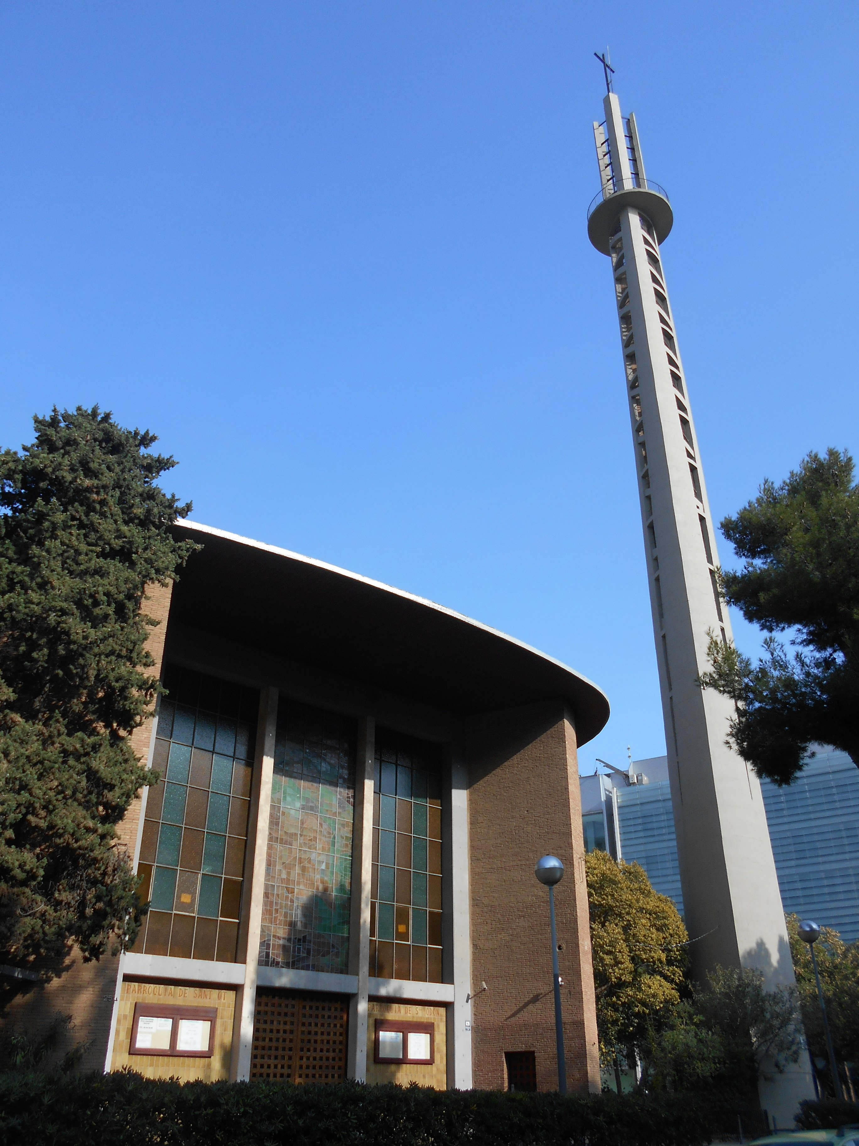 Iglesia de San Odón, Barcelona.